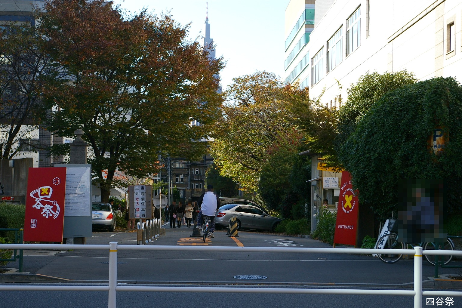 2009.5日本国内で塾生 (talk)が撮影。